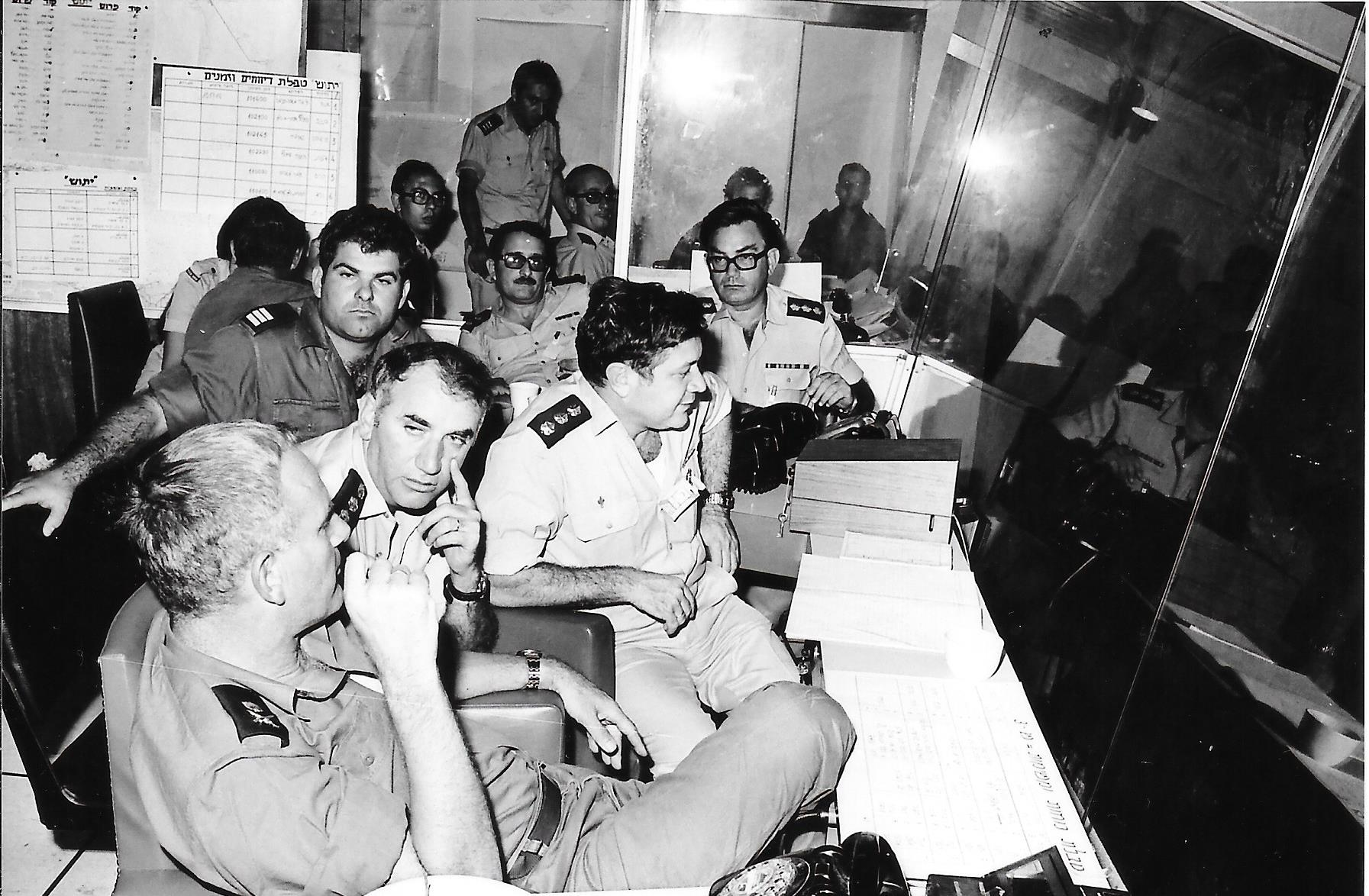 מוצב הפיקוד הימי במלחמת יום הכיפורים אוקטובר 1973